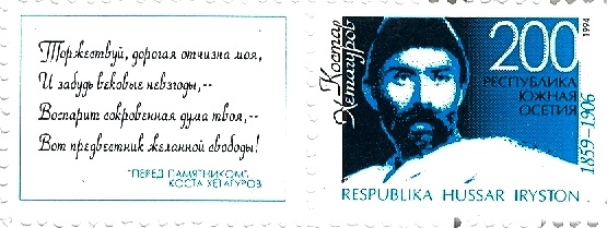 Марка приуроченная к юбилею К.Л.Хетагурова